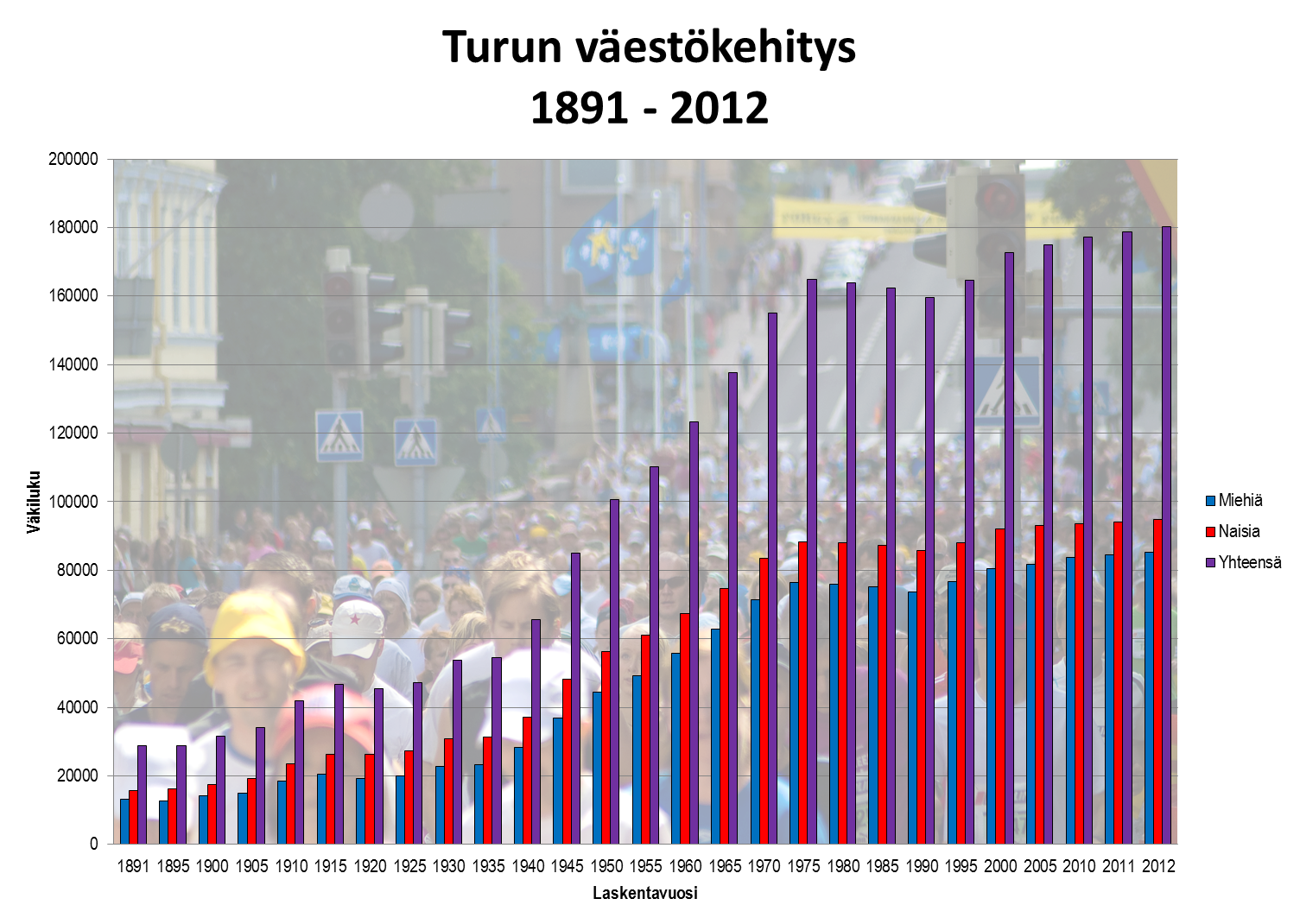 Turun väestökehitys vuosina 1891-2012